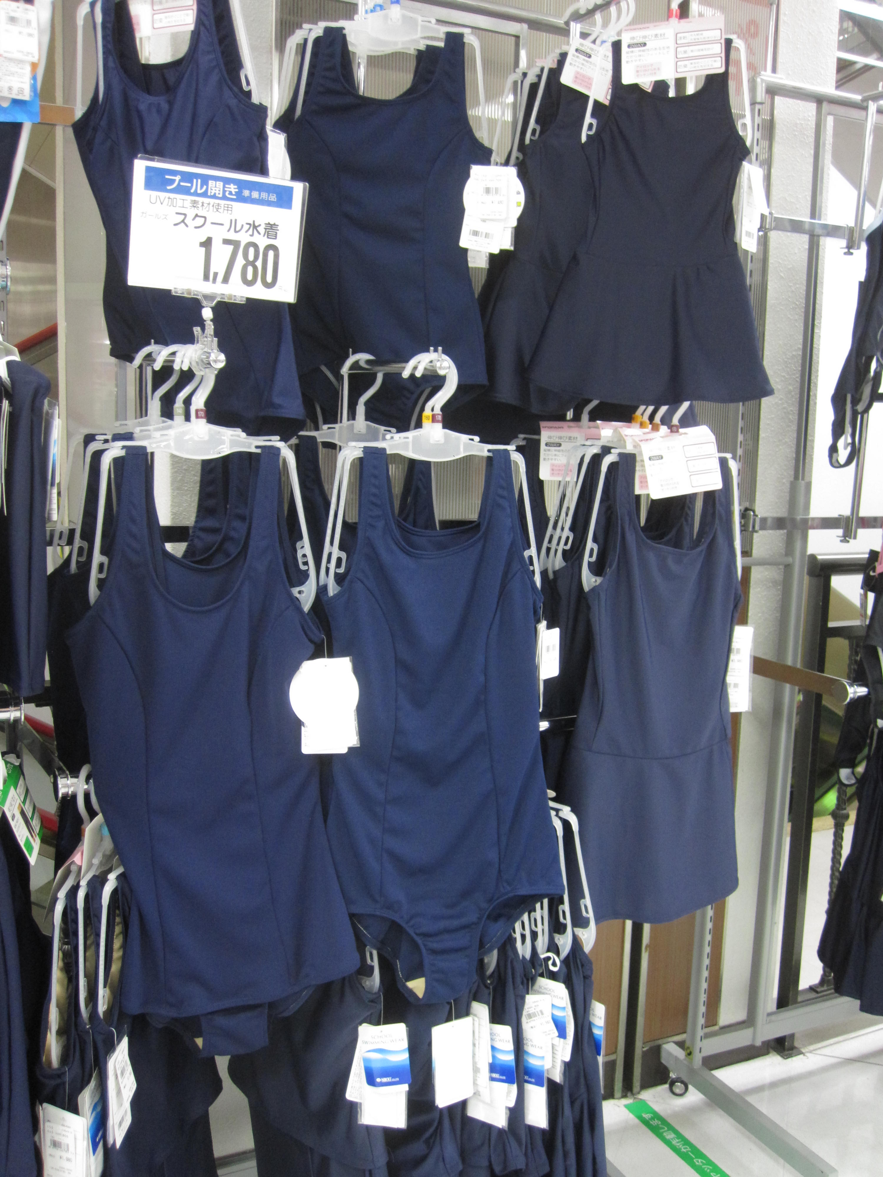 旧スクって現役なのね。